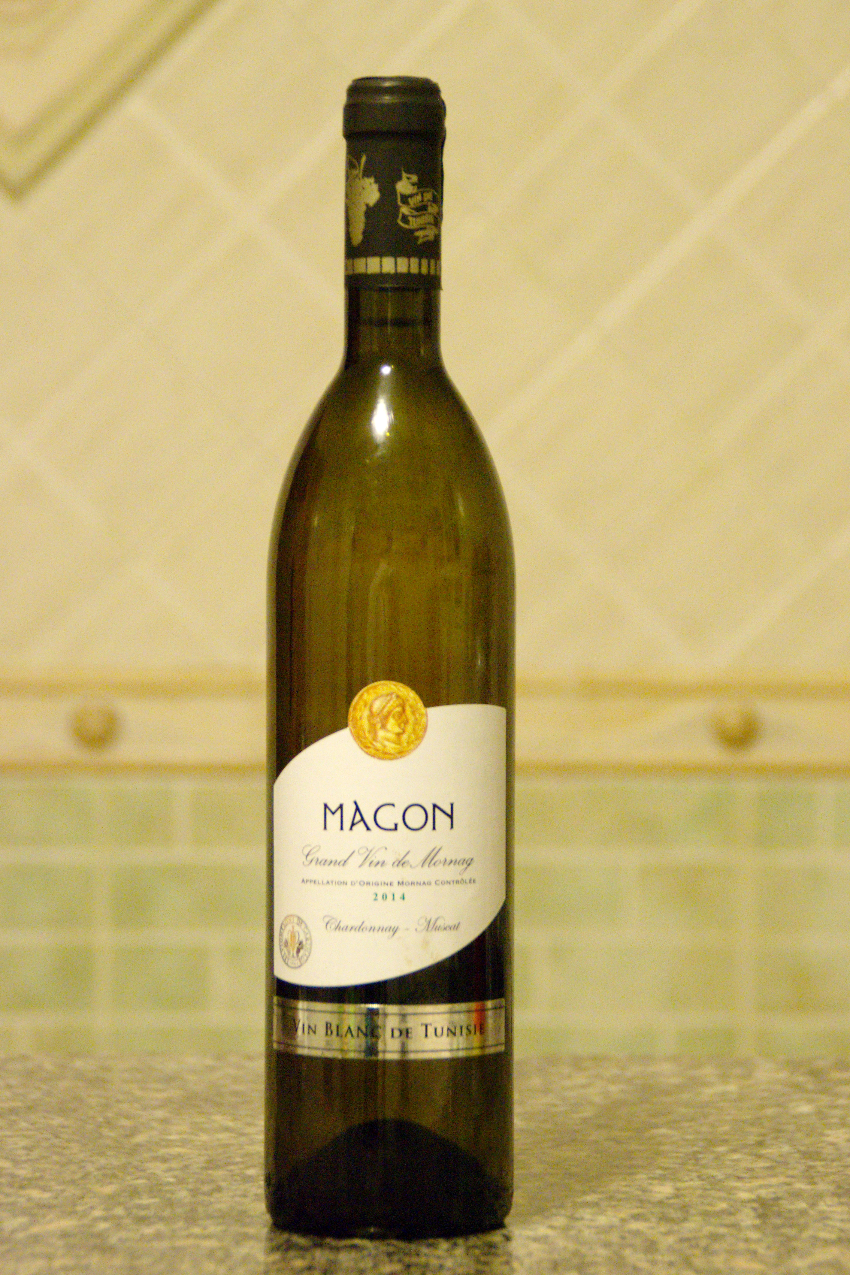 Bouteille de vin blanc (2014) qui porte le nom de Magon.